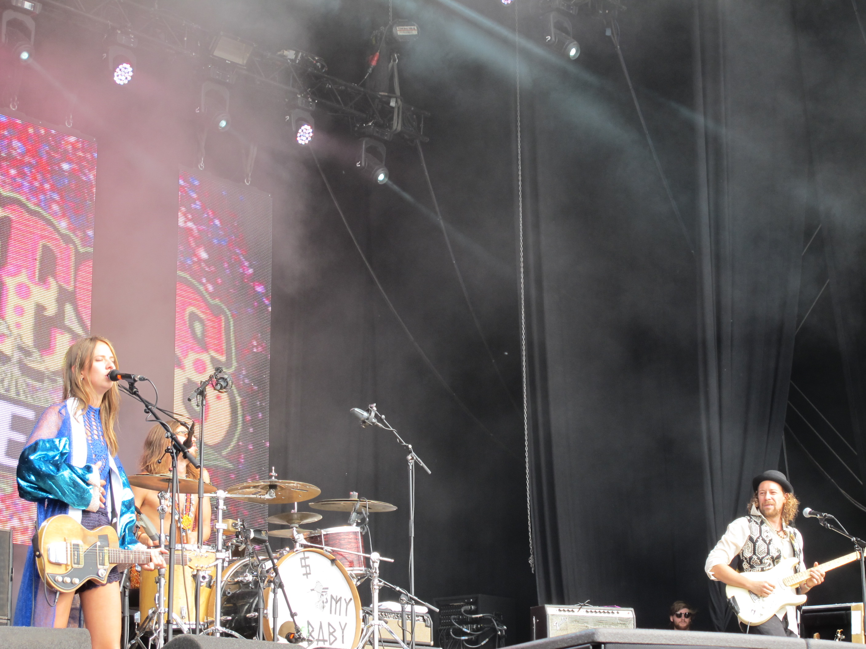 My Baby op de Zwarte Cross 2016.